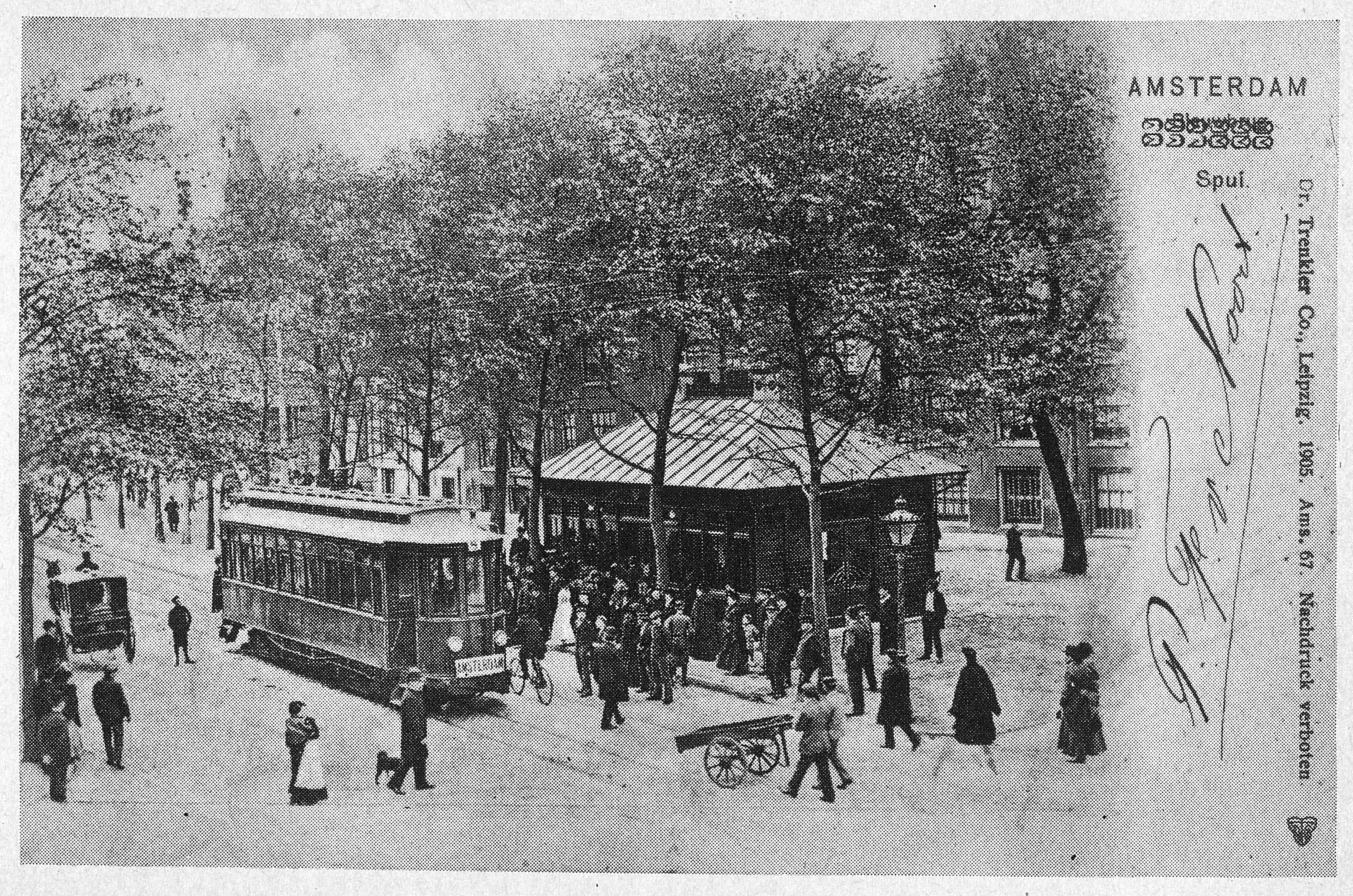 Photographed in Amsterdam between 1900 and 1914.